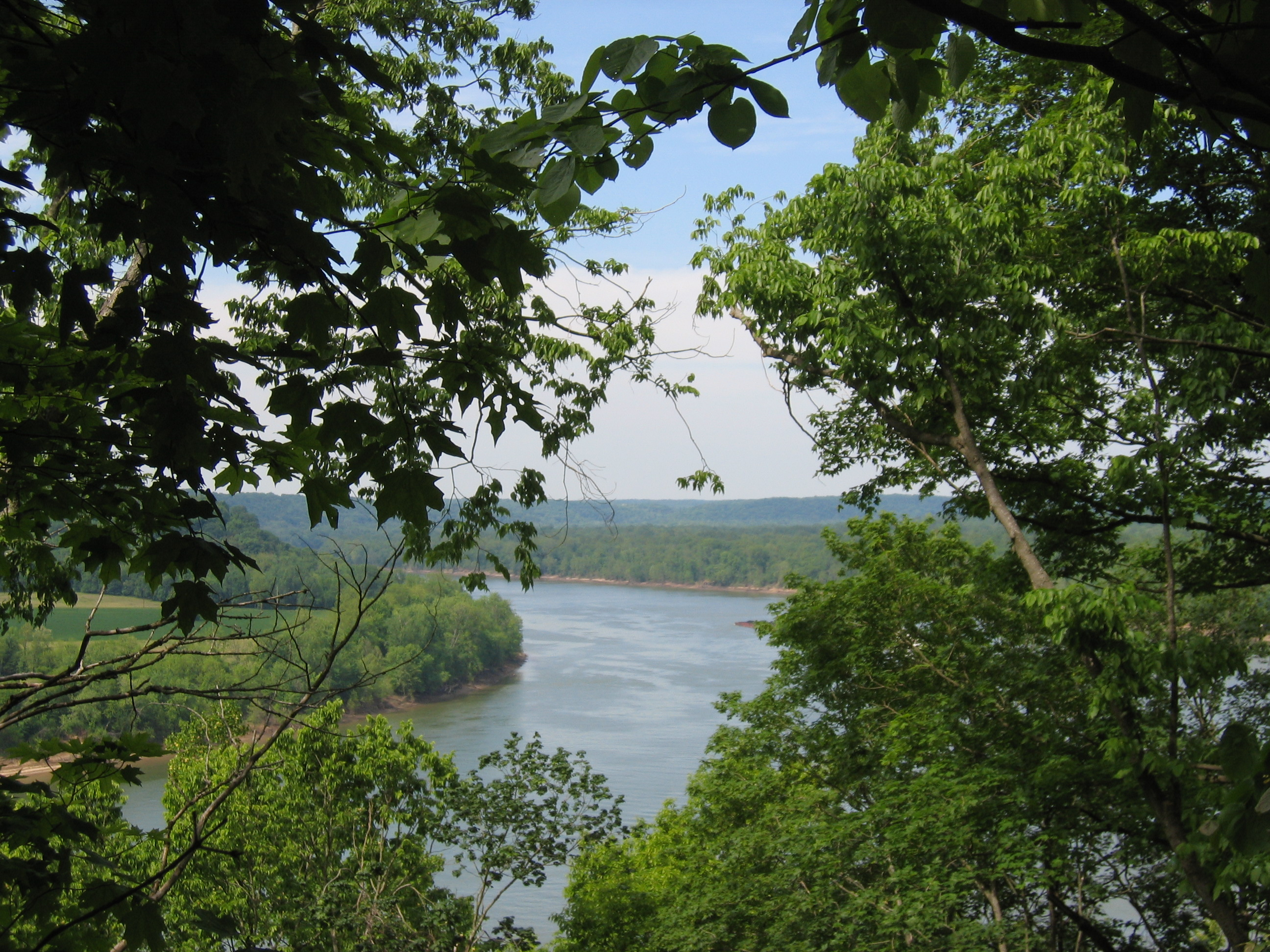 Blick im Norden des Otter Creek Parks (Otter Creek Outdoor Recreation Area) auf den Ohio; Meade County, Kentucky, USA